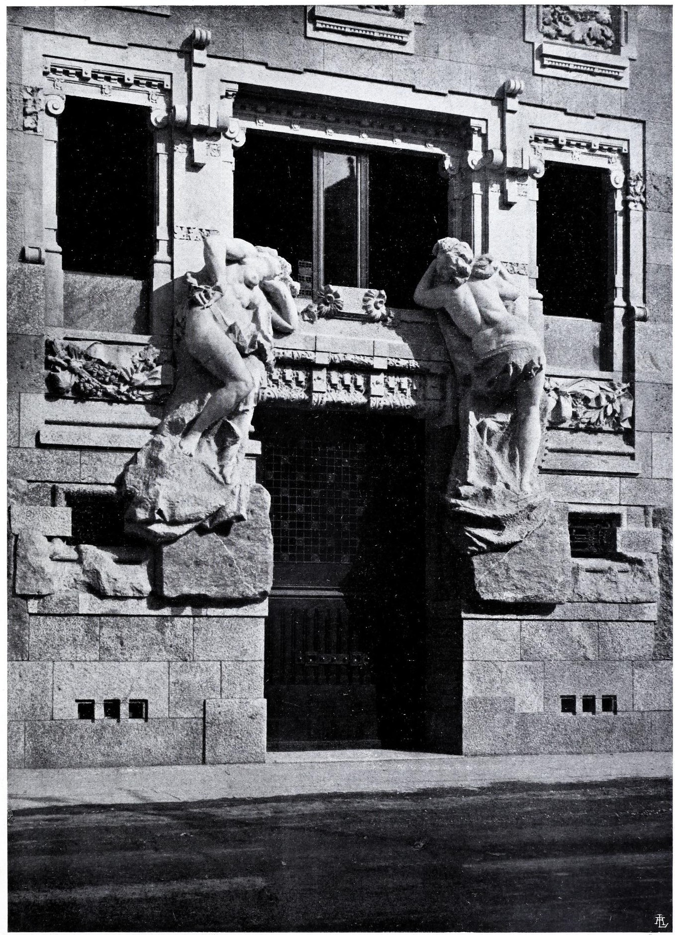 Il Palazzo Castiglioni - Corso Venezia, Milano. Porta originaria della facciata verso il Corso Venezia (1905). Da L'Edilizia Moderna, aprile 1905